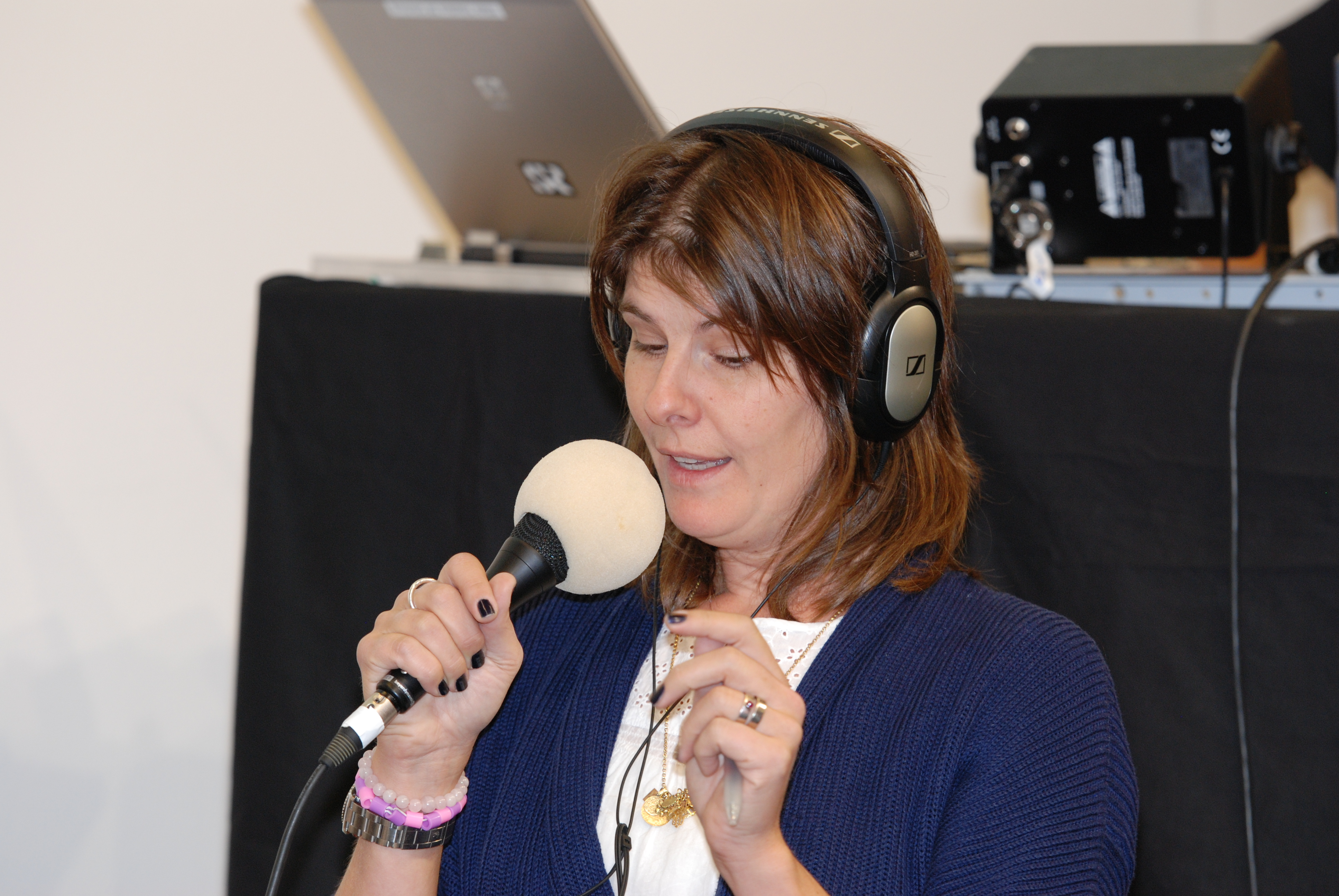 Programledaren Sara Wennerblom Arén i inslaget "DVD-Sara" i P4-programmet Zimmergren & Tengby från Bokmässan i Göteborg 29 september 2013.